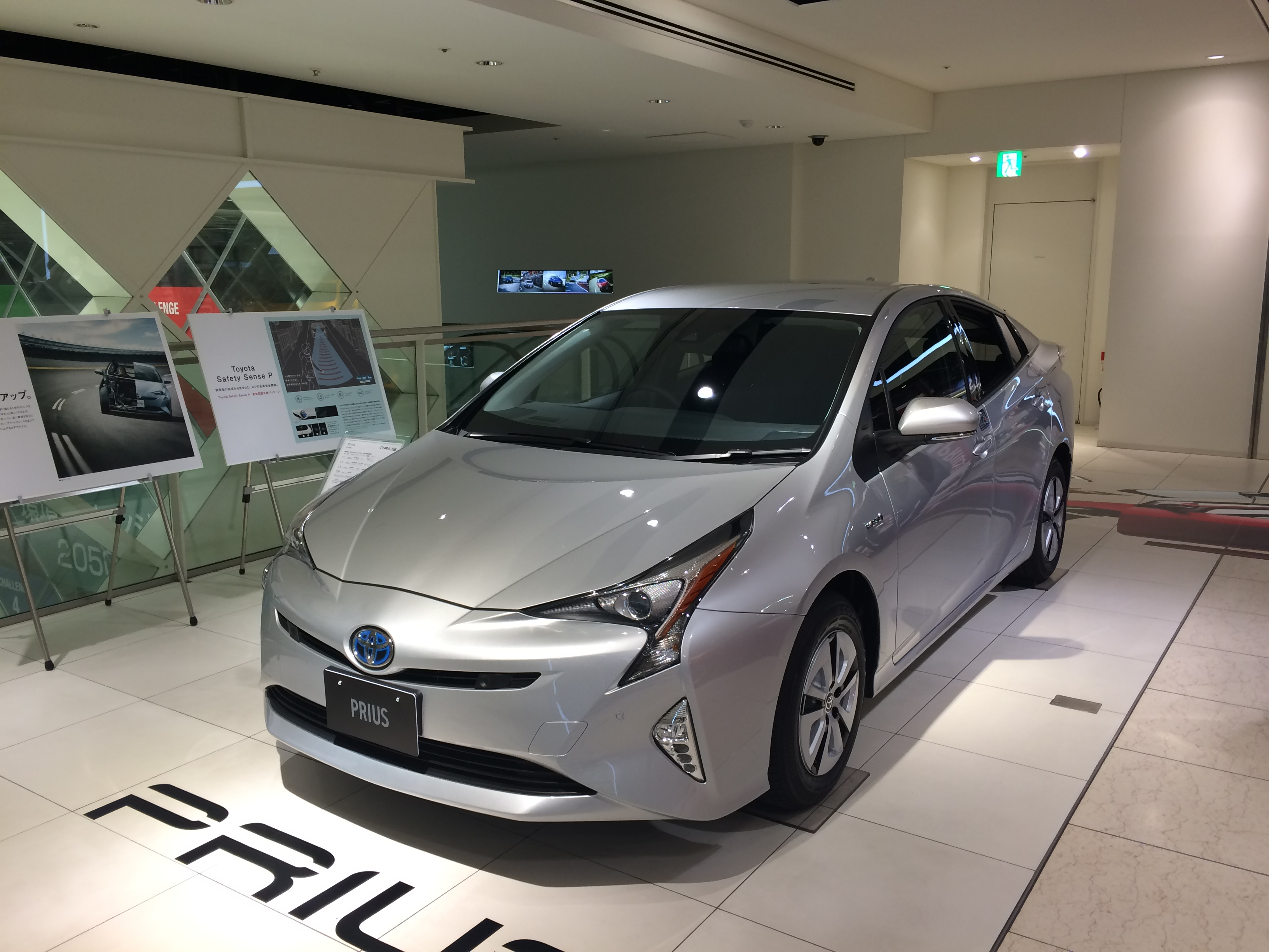 トヨタ・プリウス（ZVW50）